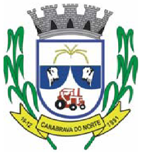 Brasão do município de Canabrava do Norte, estado de Mato Grosso, Brasil. Coat of Arms of the city of Canabrava do Norte, Mato Grosso, Brazil.